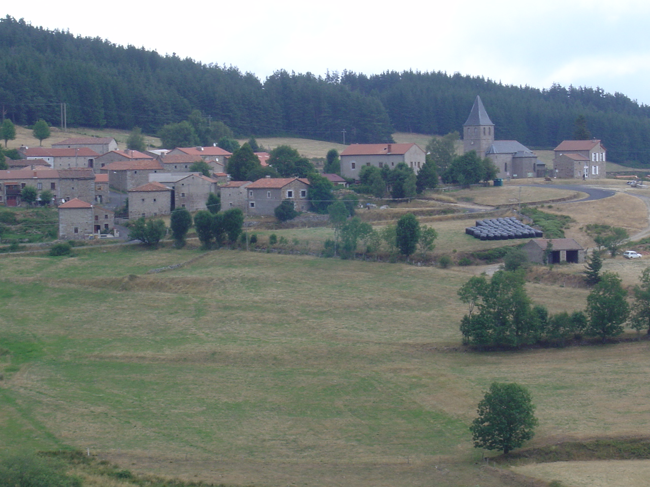 Auvers